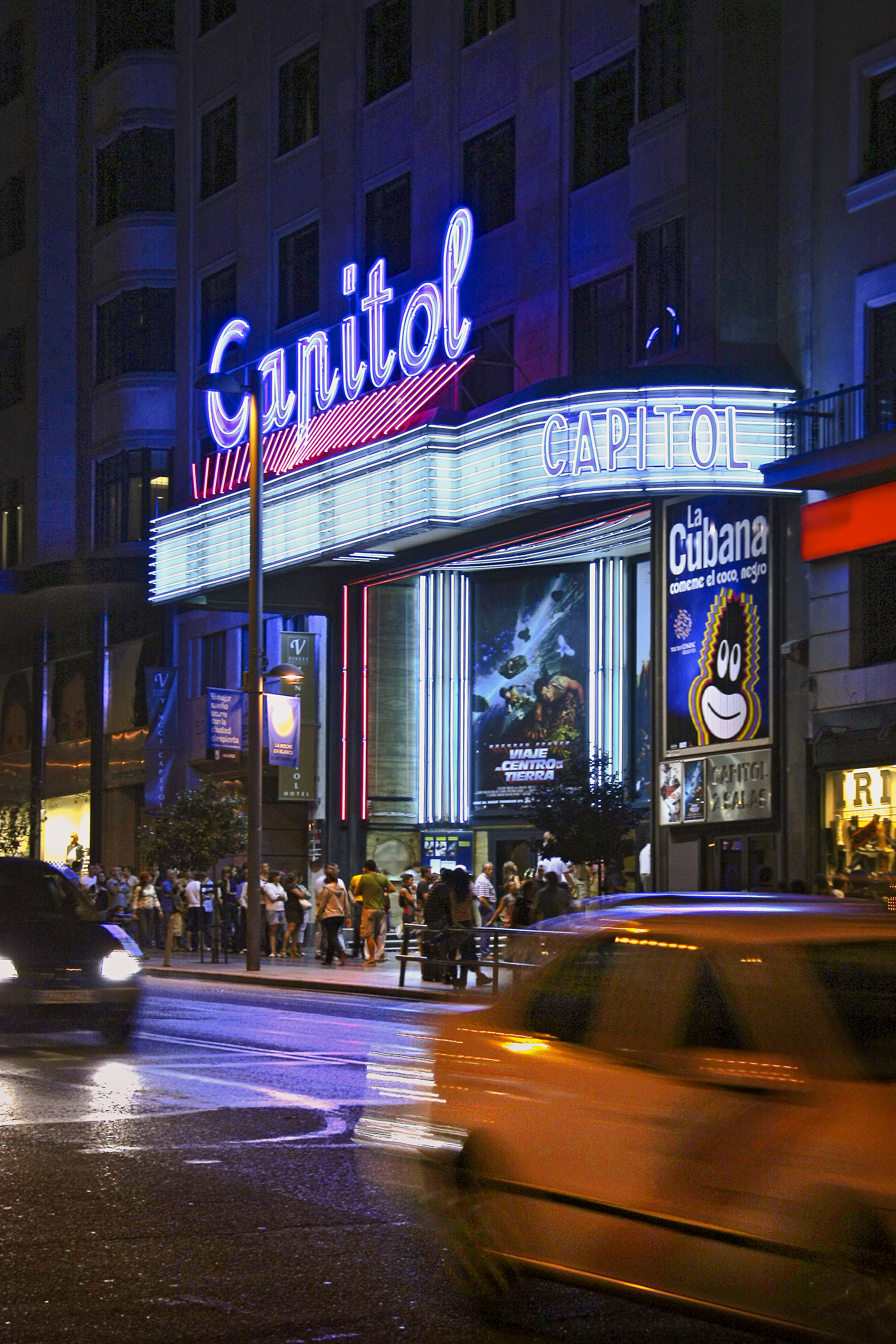 Cine Capitol, Madrid, España